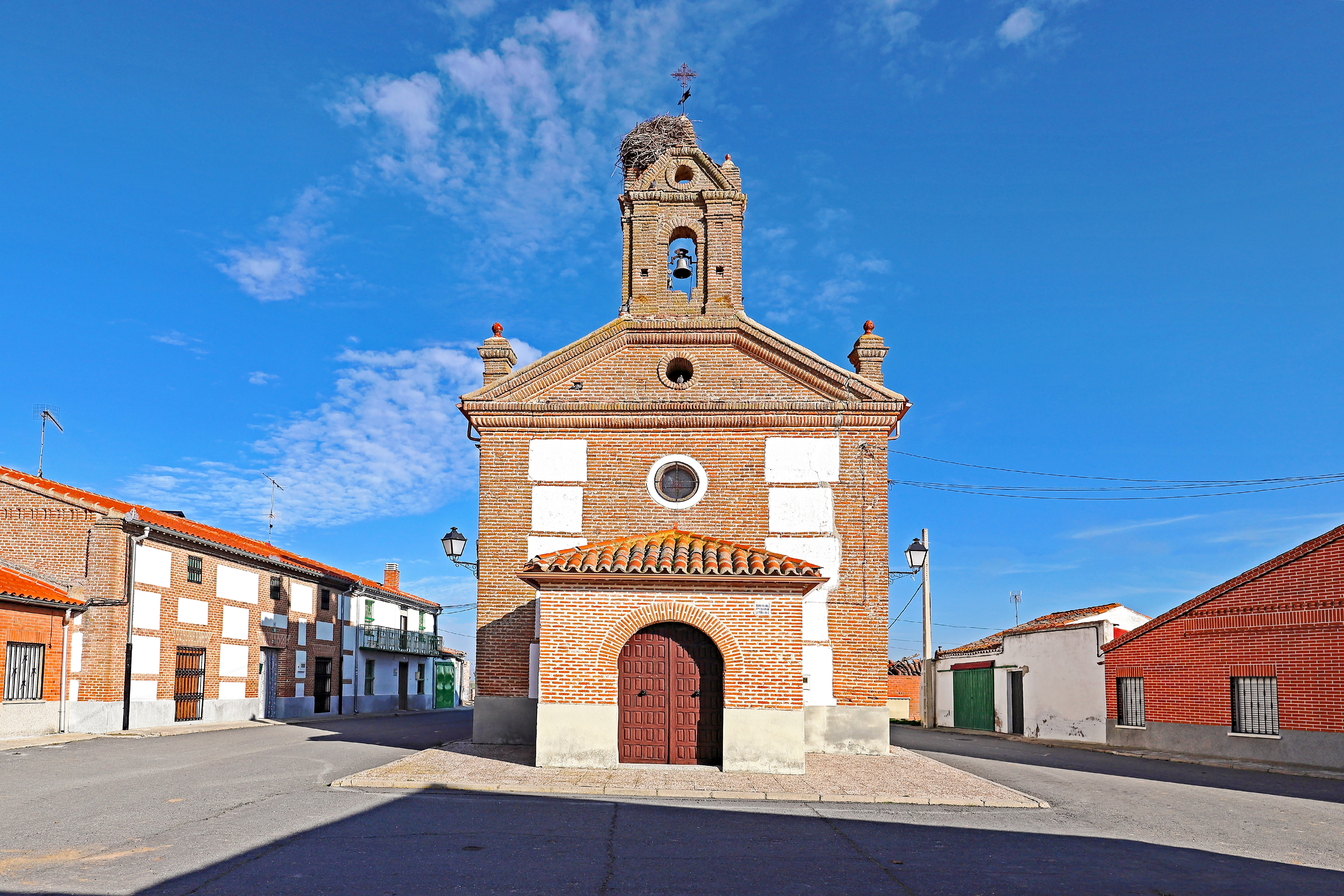 Rasueros es un municipio que pertenece a la comarca de La Moraña, provincia de Ávila.